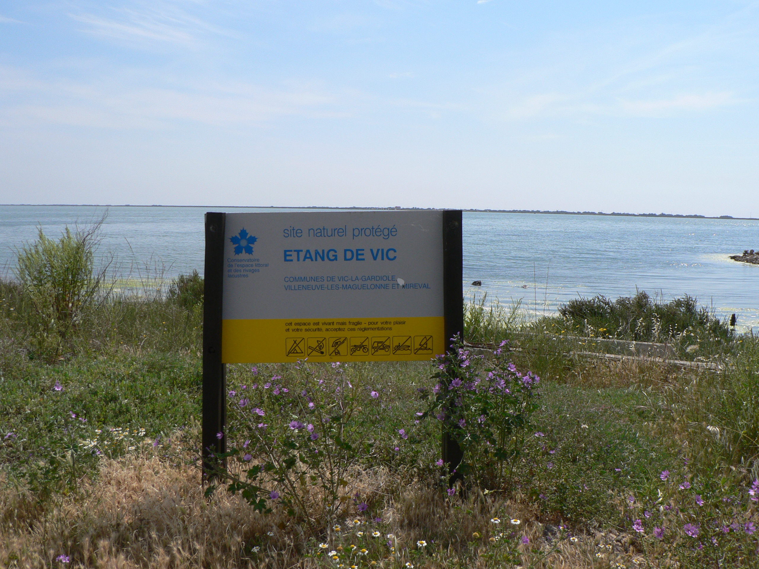 Etang De Vic la Gardiole